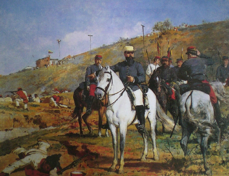 Joaquín Crespo en la Batalla de Los Colorados